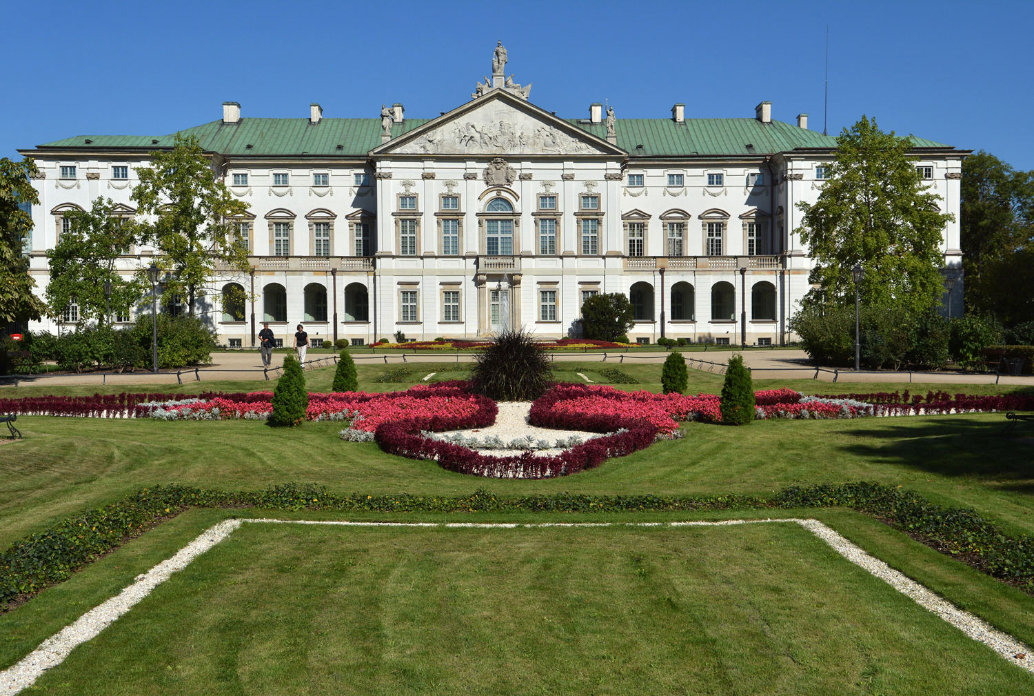 Biblioteka Narodowa, Pałac Krasińskich (Pałac Rzeczypospolitej), widok od strony Ogrodu Krasińskich